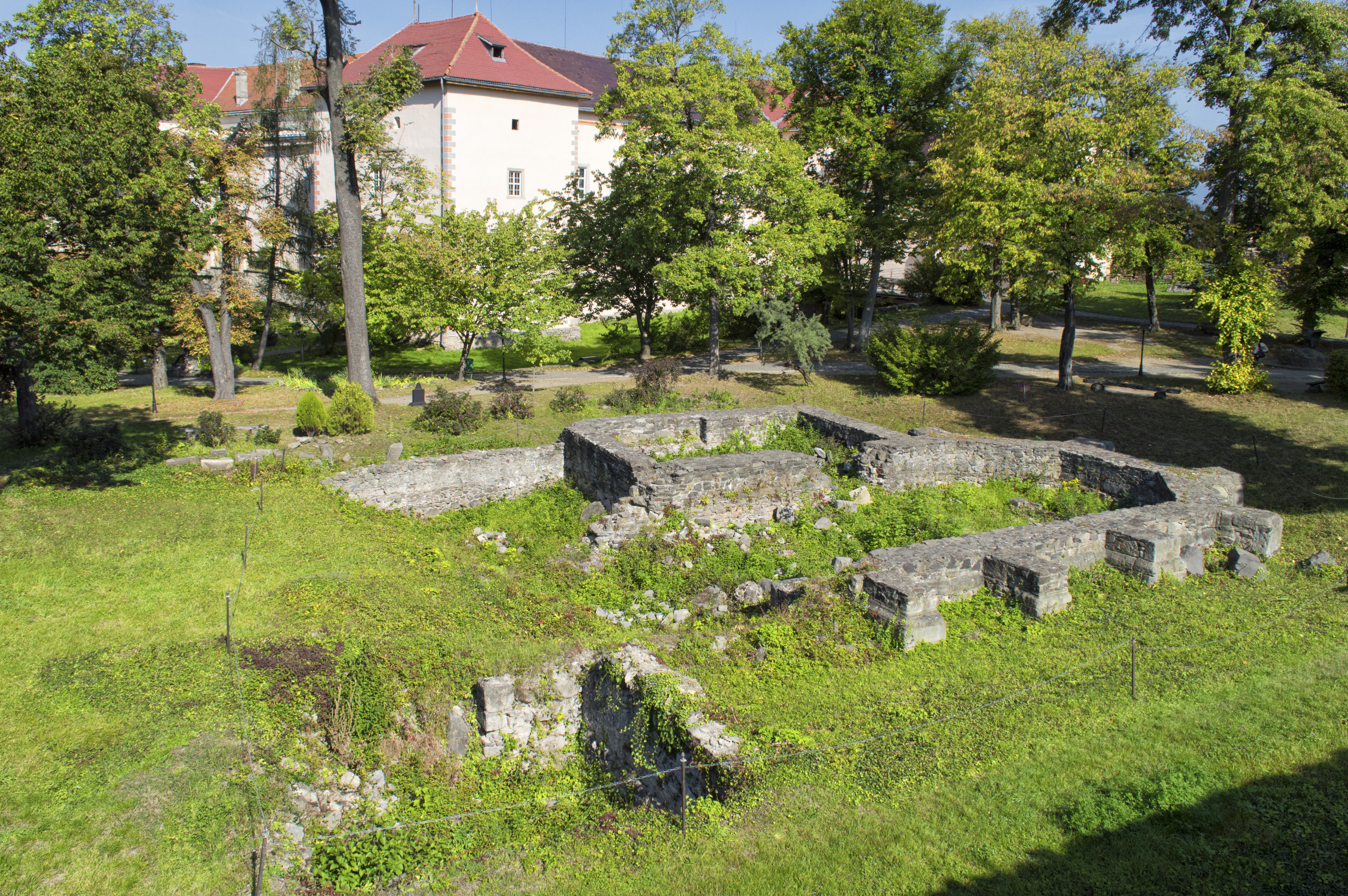 Замок-фортеця (мур.), Ужгород, вул.Капітульна, 33